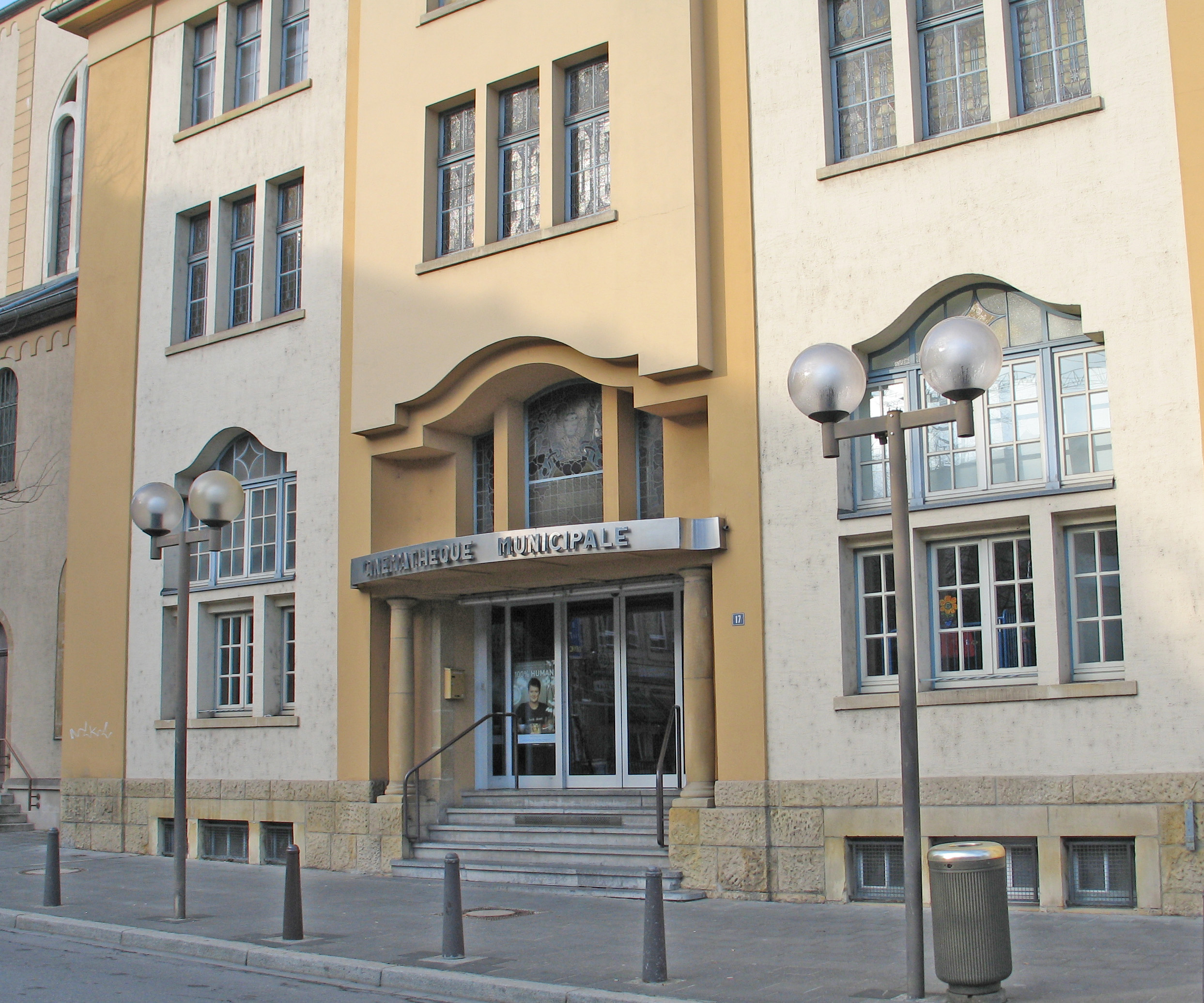 De Kino Vox, haut Cinémathèque municipale de Luxembourg.